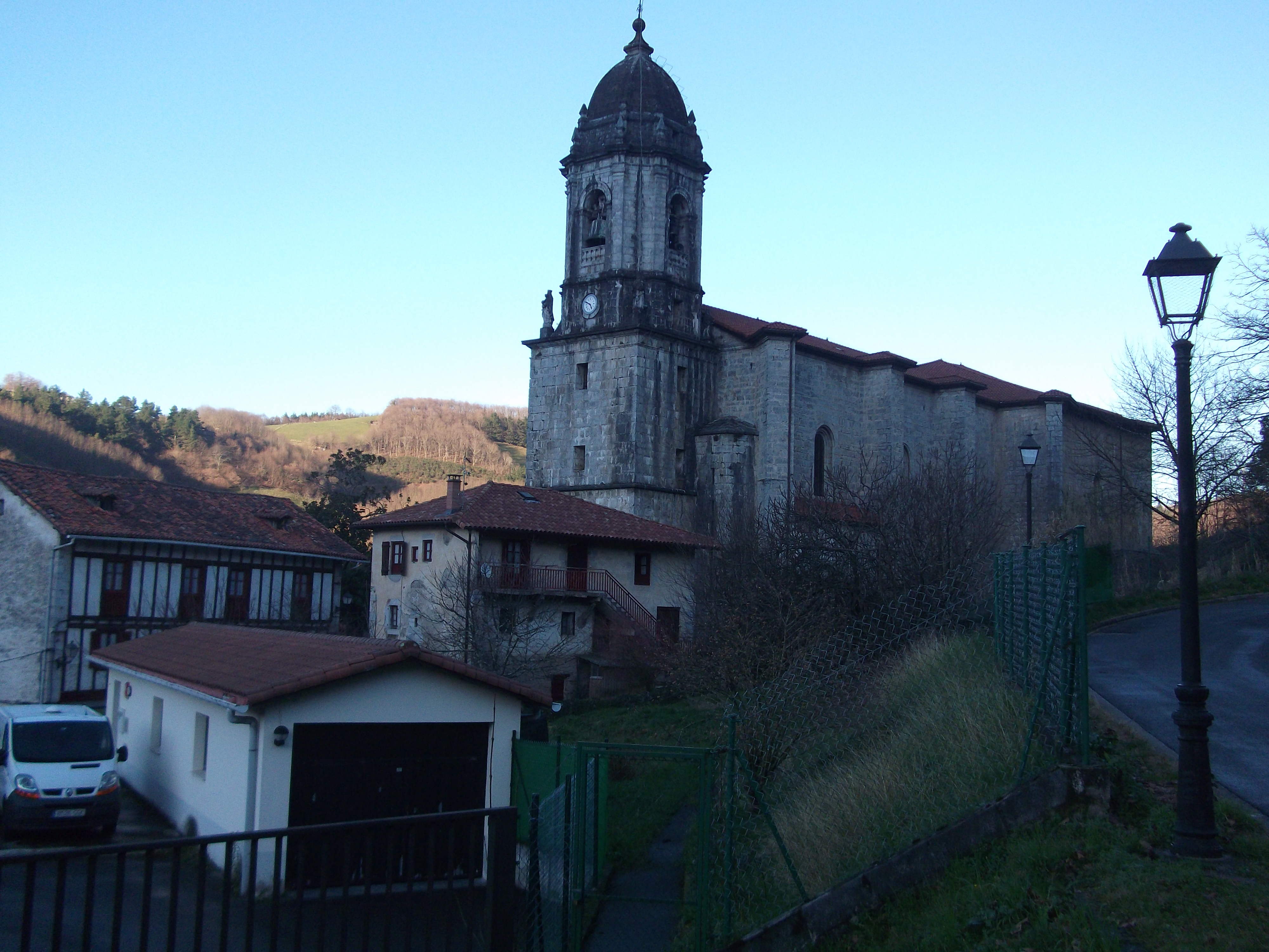 Iglesia de Lesaca, Navarra.